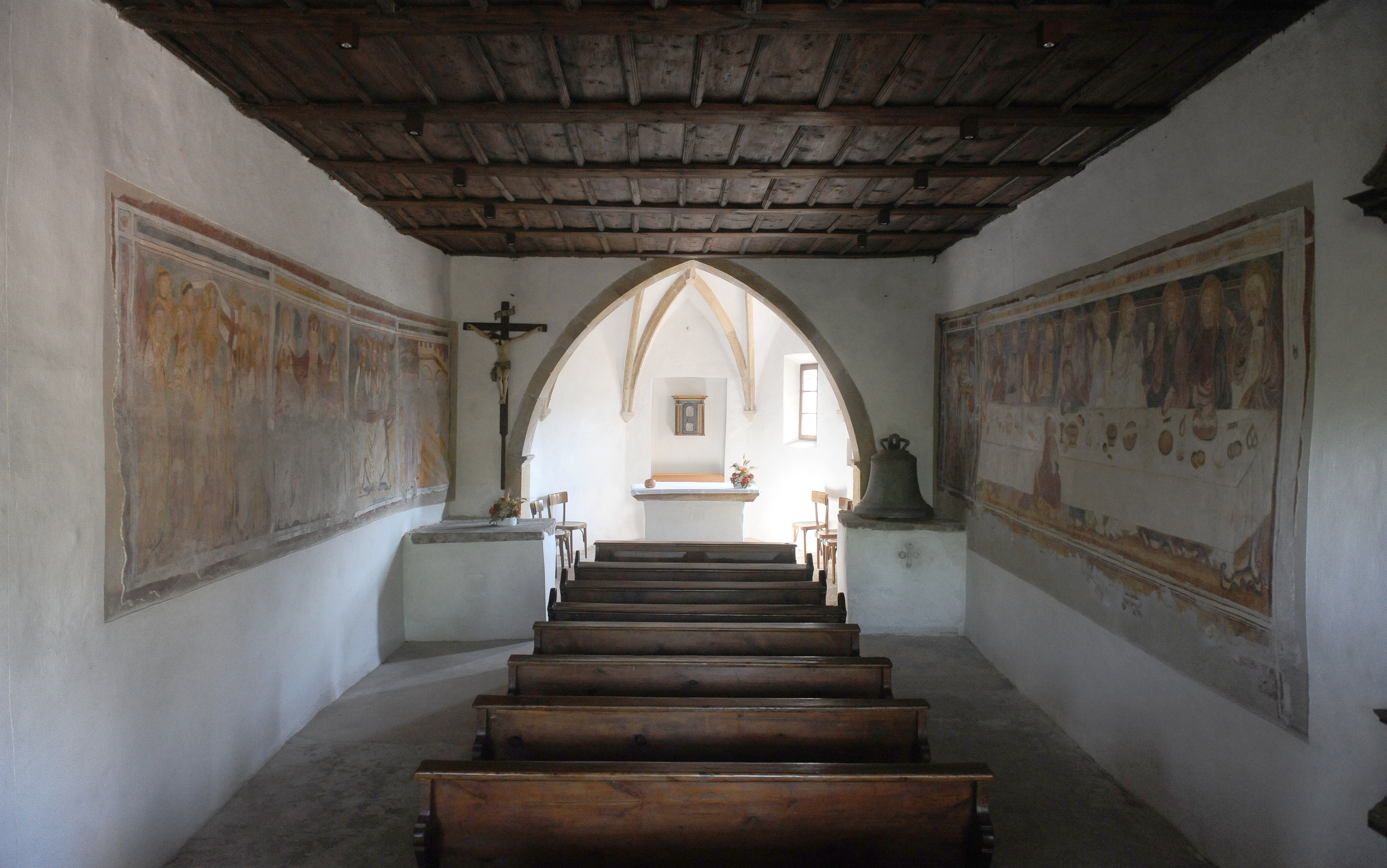 Chiesa di San Leonardo a Lisignago. Interno.